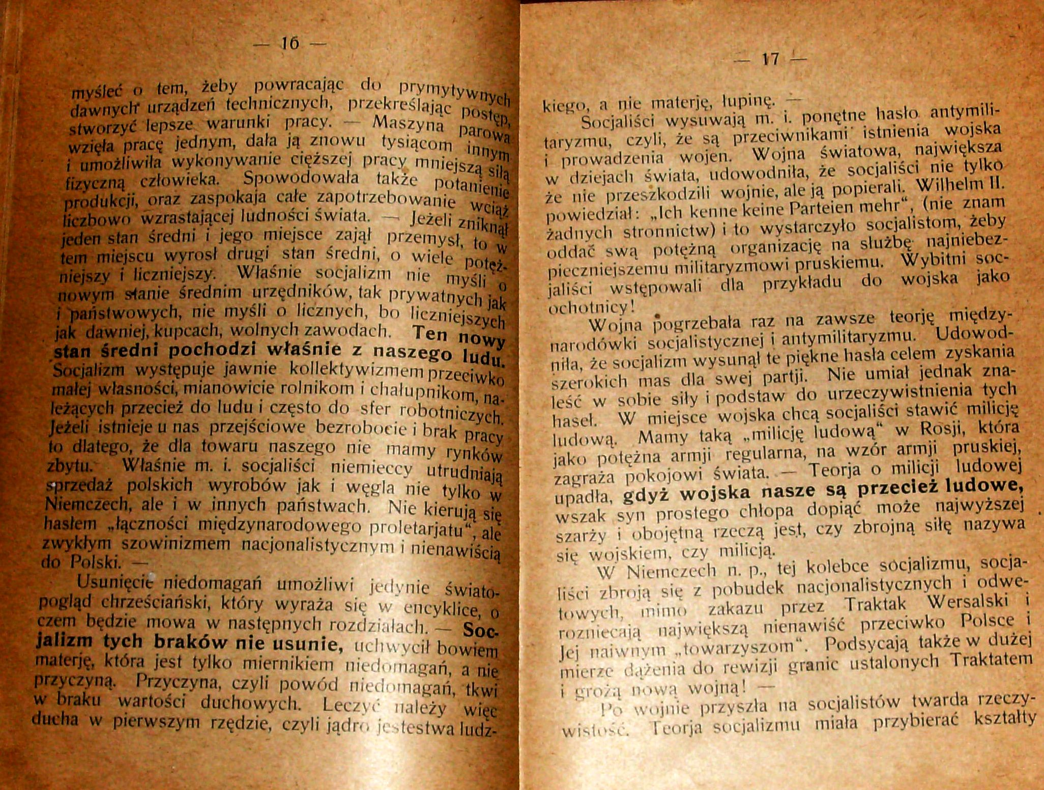 Stanisław Krzyżowski, Rozmyślania w czterdziestą rocznicę encykliki „Rerum novarum”, wydanej 15 maja 1891 r. przez papieża Leona XIII, Pszczyna 1931